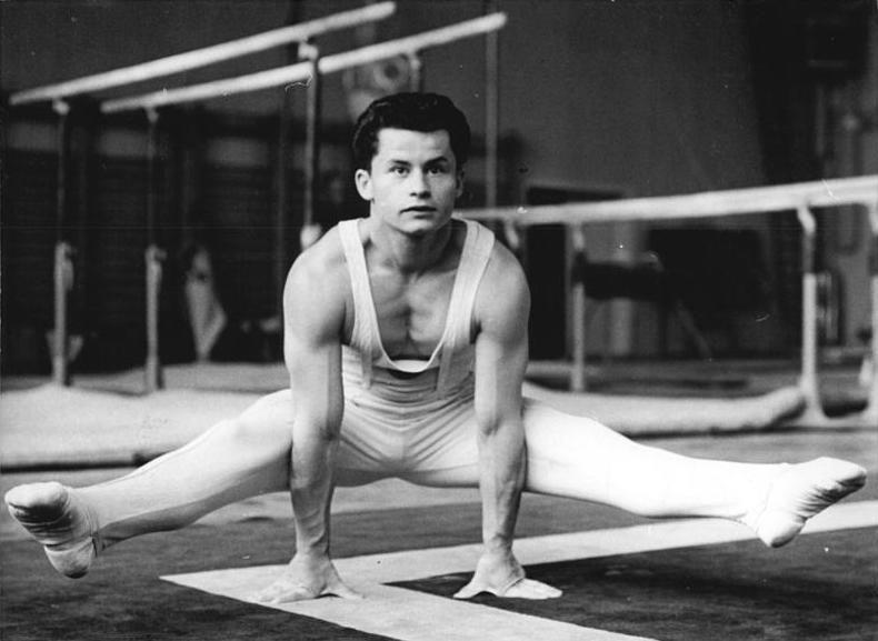 Peter Weber Zentralbild Kohls Ks-Qu. 22.6.1962 Turnweltmeisterschaften 1962 in Prag. Vom 3. bis 8.7.1962 finden in Prag die Turnweltmeisterschaften 1962 statt. Das DDR-Aufgebot der Männer umfasst 8 Turner. UBz: Auch der DDR-Turner Peter Weber (ASK Vorwärts Berlin) trainiert eifrig für die bevorstehenden Turnweltmeisterschaften.